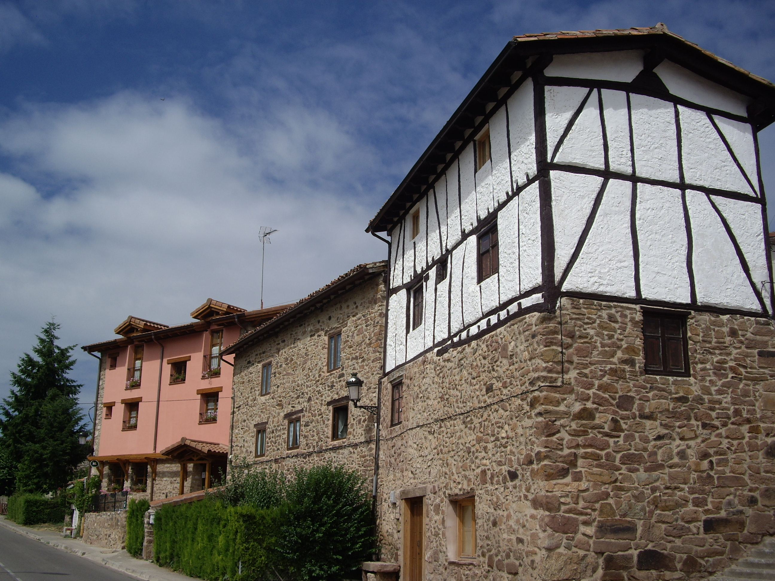 Vista de Zorraquín en La Rioja, España.